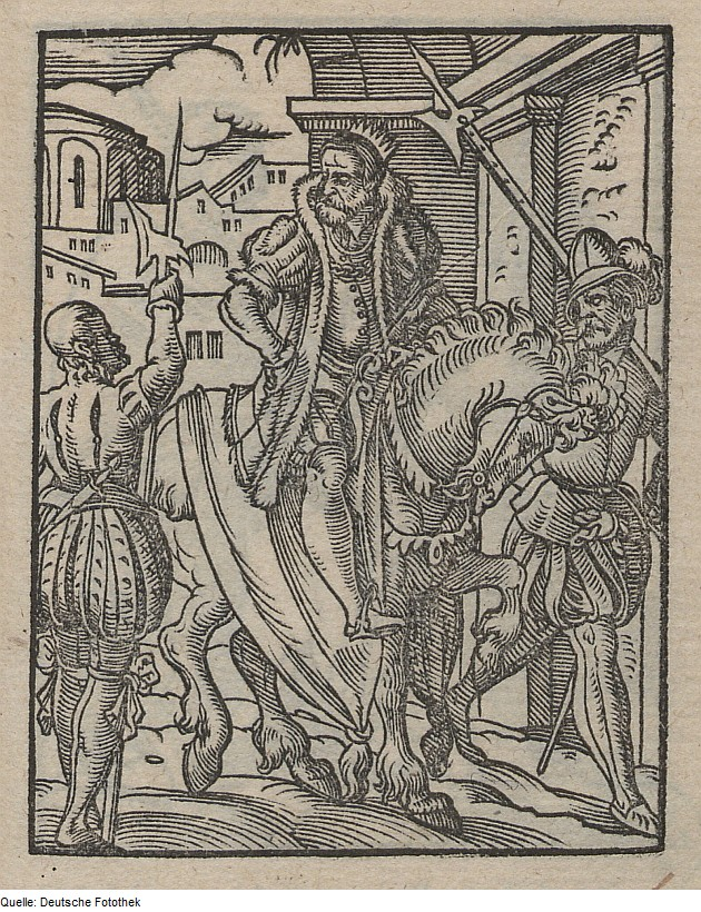 Original image description from the Deutsche Fotothek Ständebuch & General & Militär